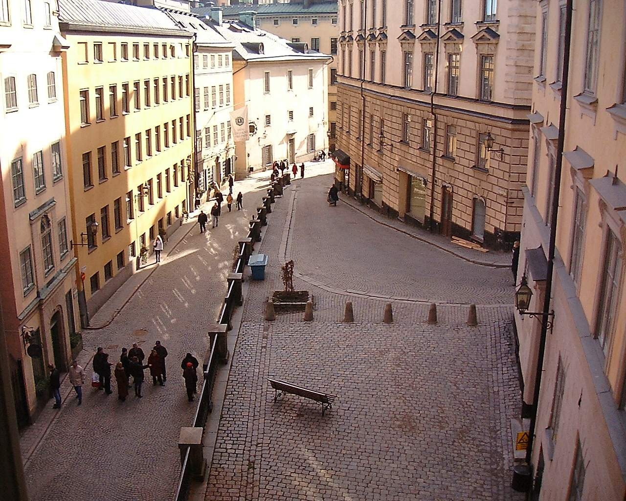 Benickebrinken, Gamla stan, Stockholm